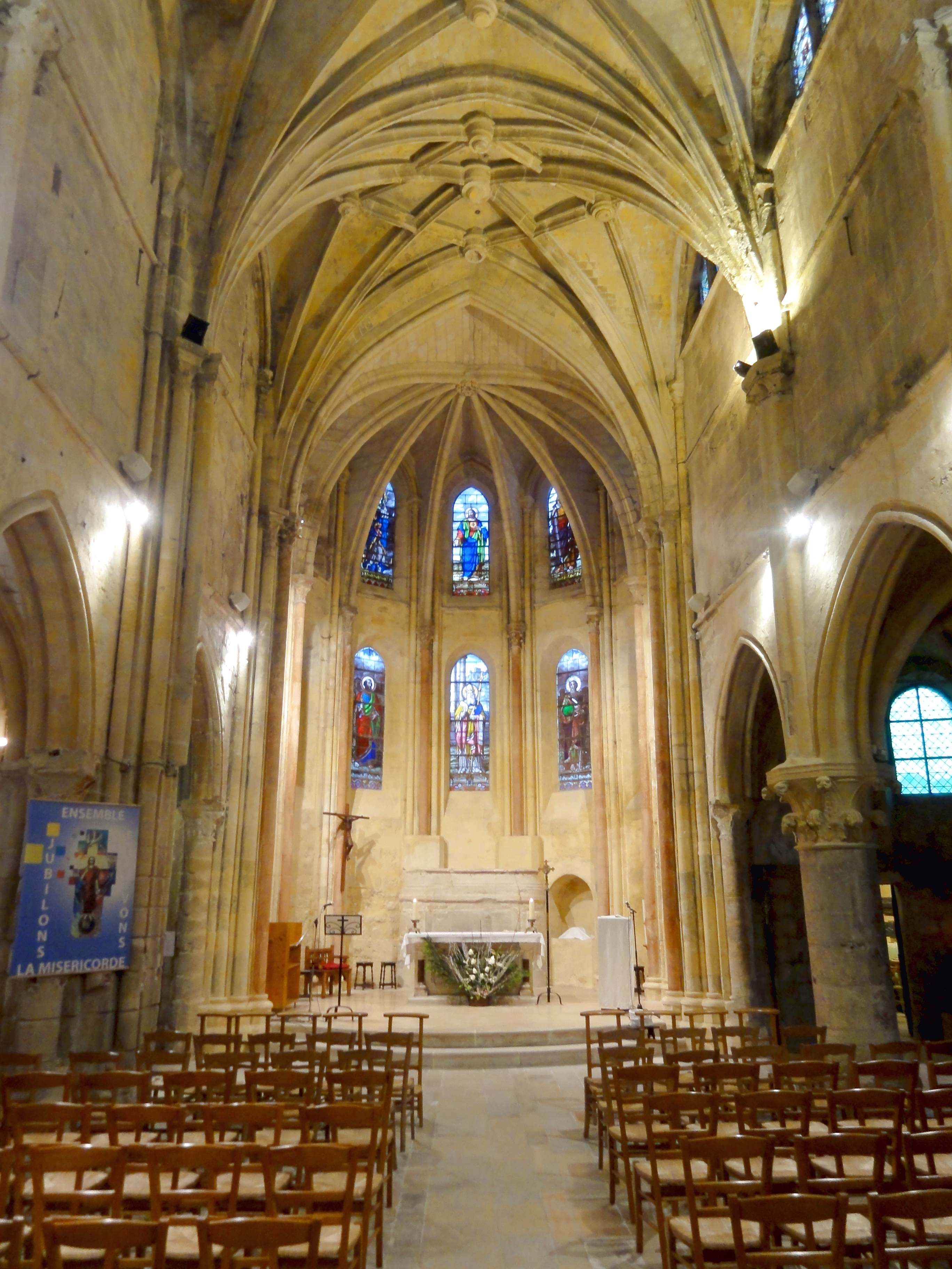 Intérieur de l'église - voir titre.